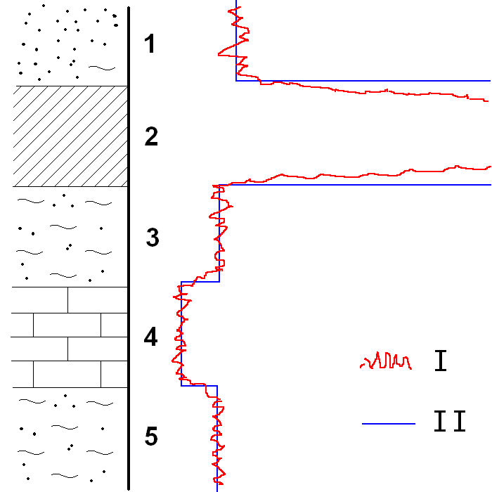 Схематическая диаграмма плотностного ГГК